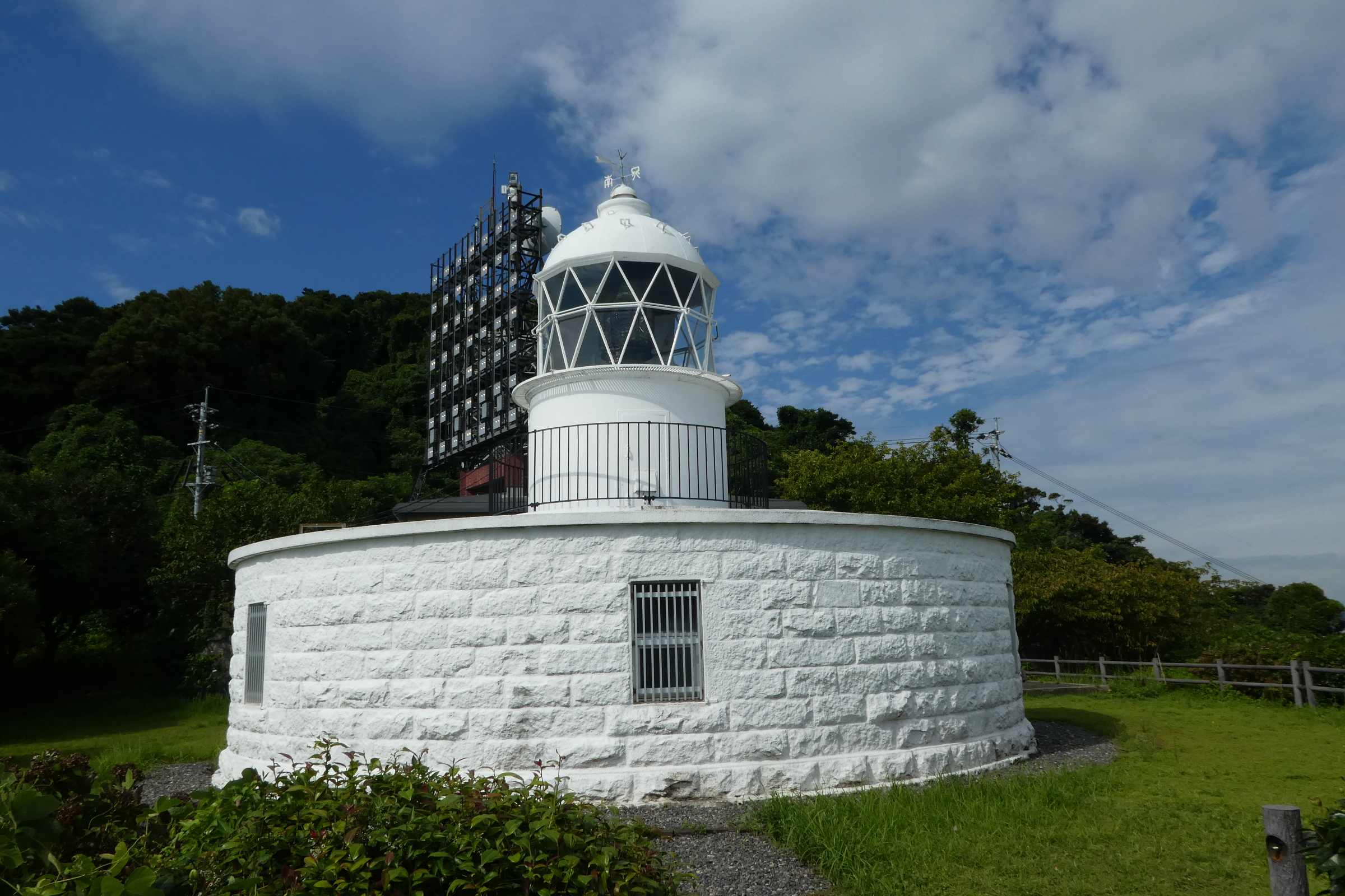 部埼灯台。後方にあるのは部埼潮流信号所の電光表示板